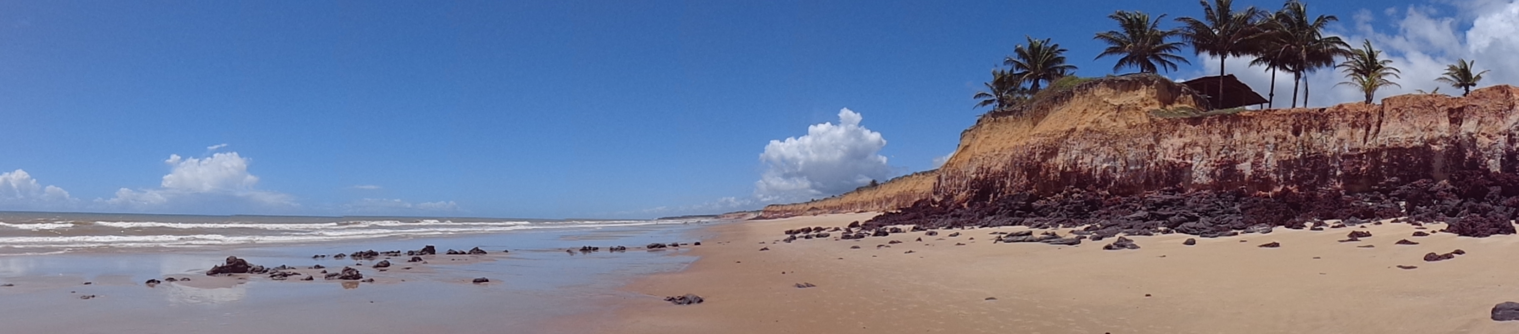 Panorâmica de Costa Dourada BA